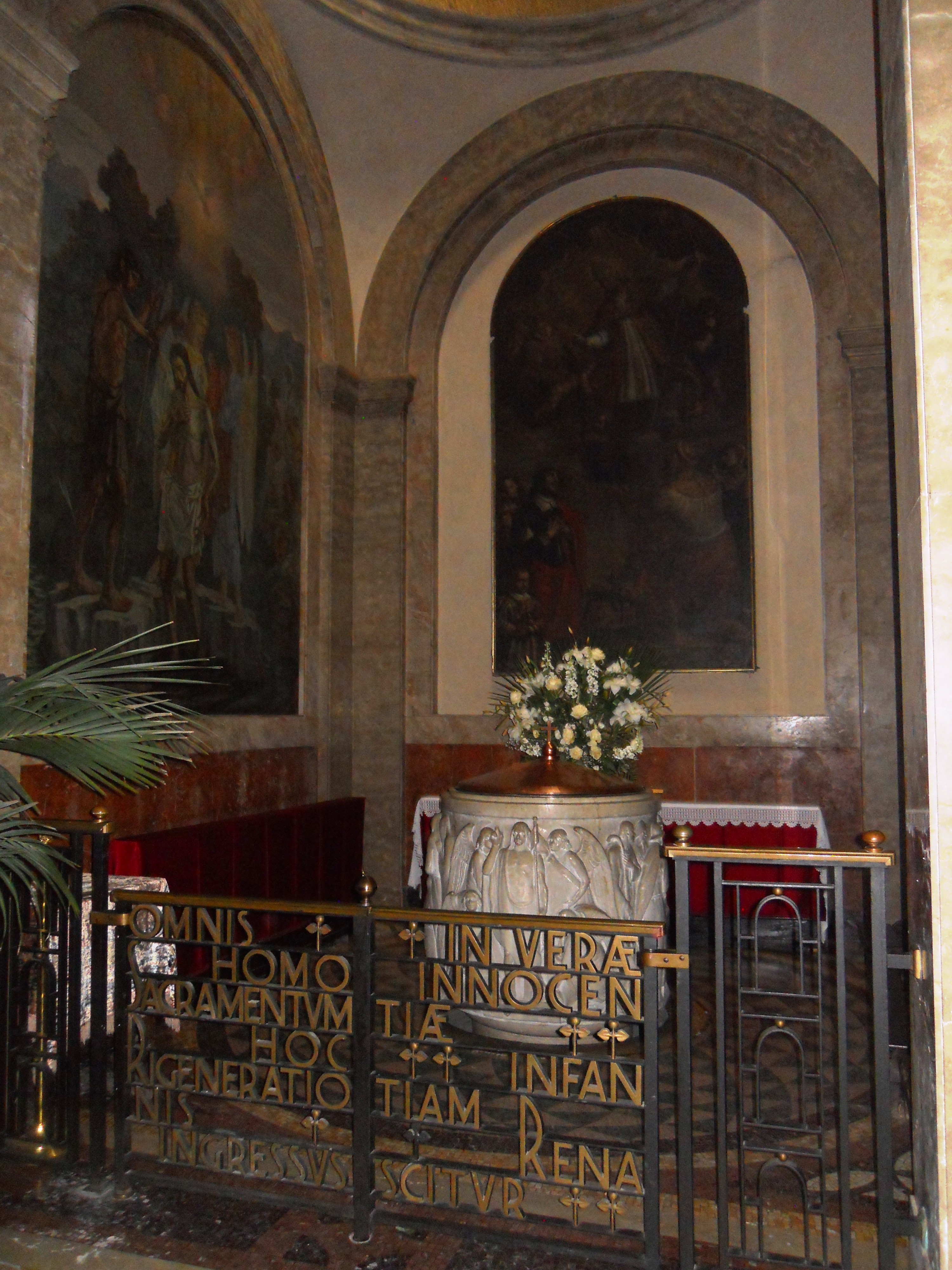 San Faustino maggiore (Brescia) (battistero)